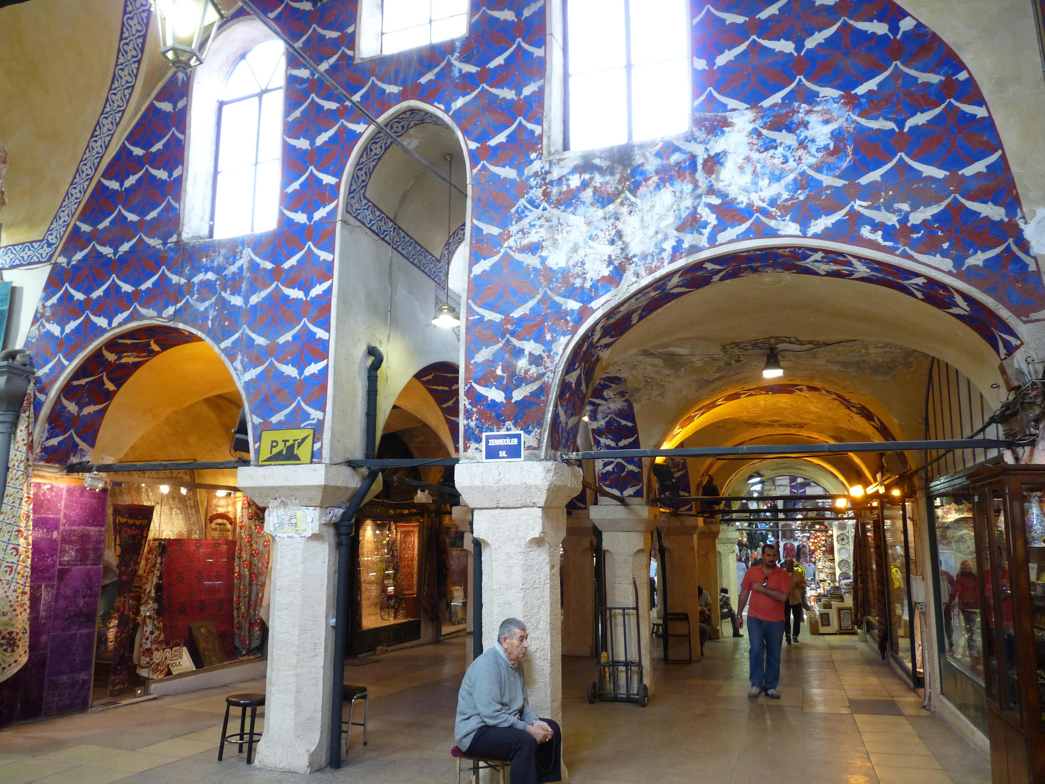 Grand Bazaar 06